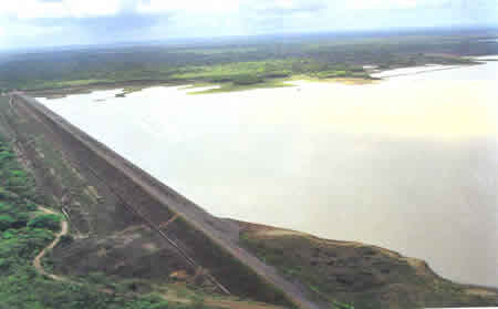 Presa Vista Alegre.